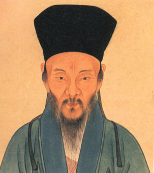 [明朝] 王守仁 像 设色 来自：王守仁 像——姚江人物 名人堂 原作为二维平面艺术（古画），作者逝世已逾百年，无特殊版权要求。